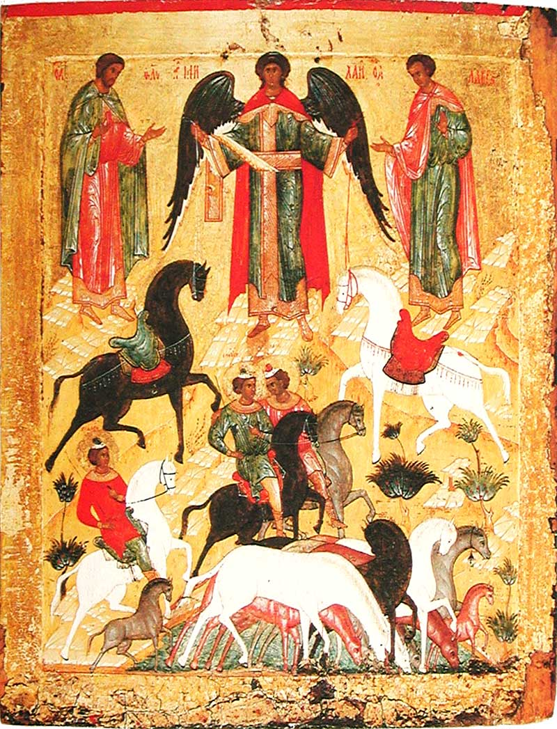 Икона Чудо о Флоре и Лавре. Третьяковская галерея, Москва.